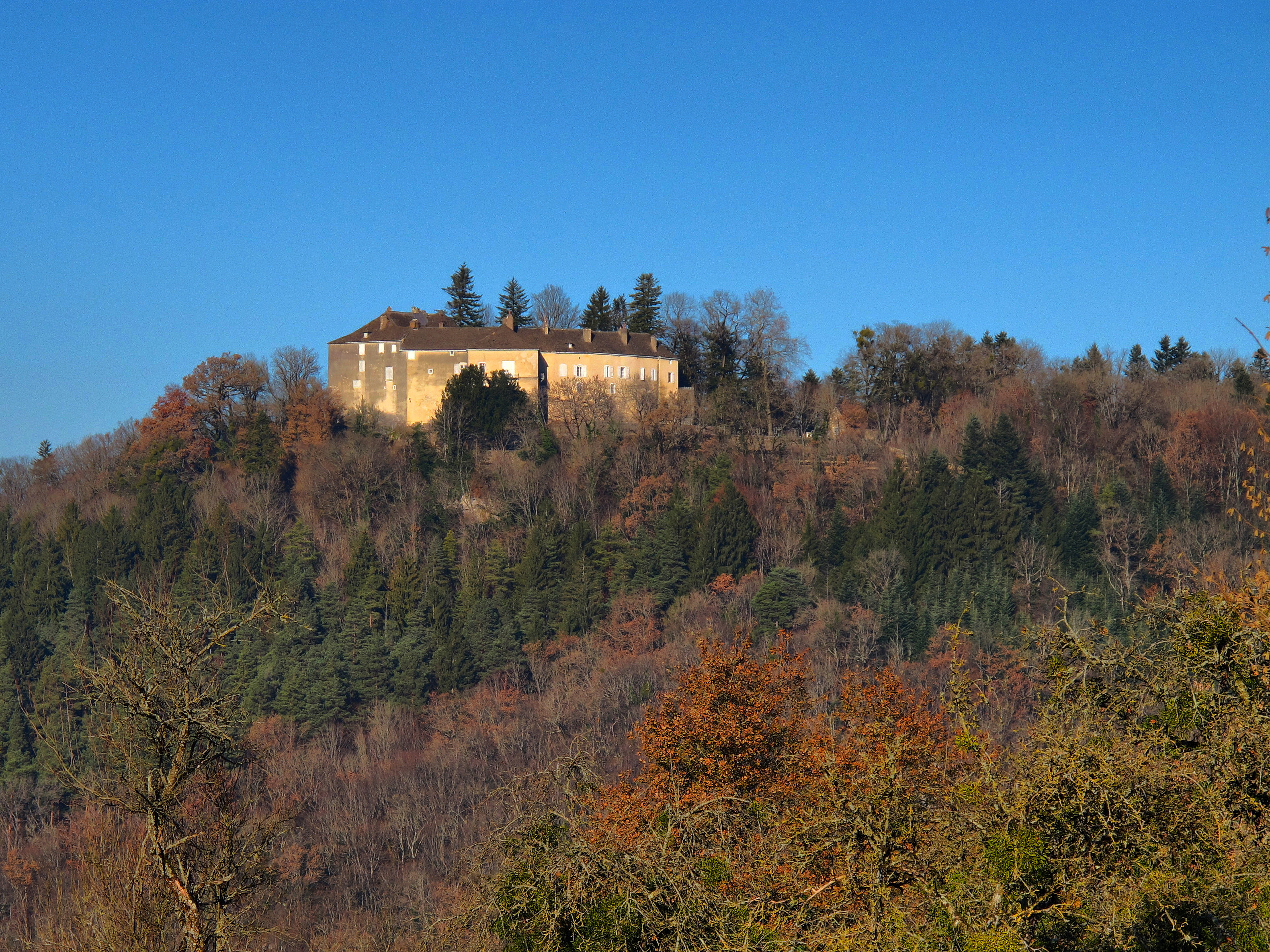 Inscrit aux monuments historiques sous le numéro PA25000030